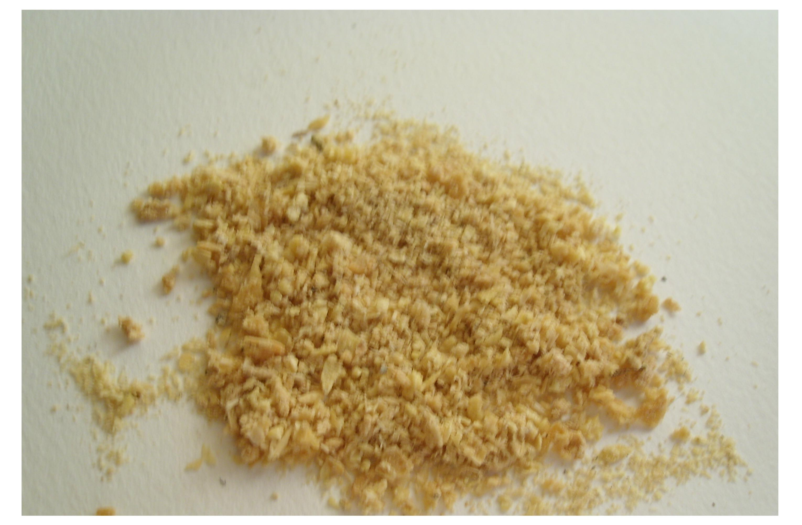 Cristalli di DMT